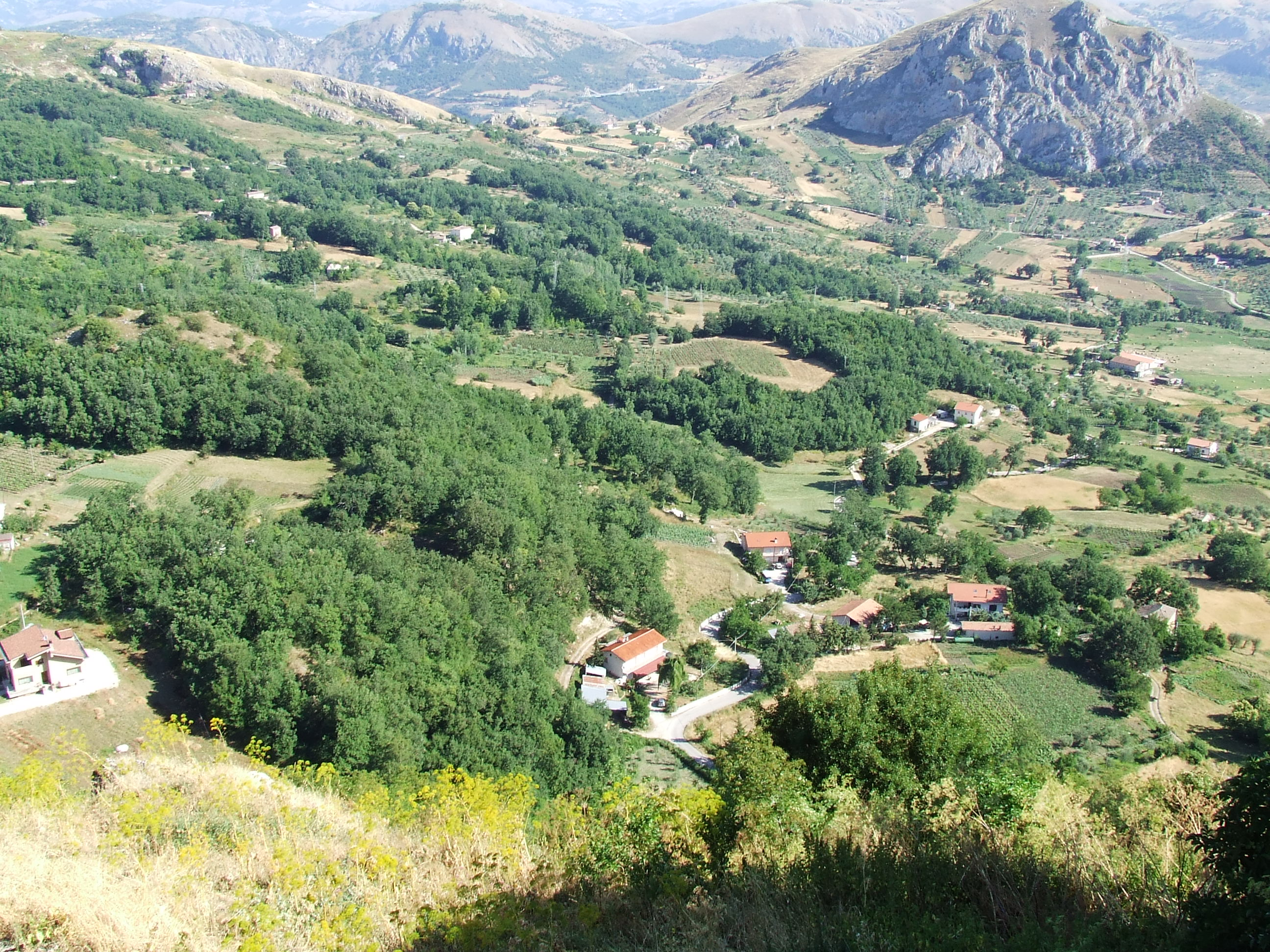 Panorama visto da Caggiano